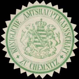 Sealing stamp Title: K. Amtshauptmannschaft zu Chemnitz Description: grün, weiß Place: Chemnitz size: 3 cm